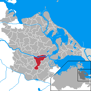 Anklam, Landkreis Ostvorpommern, Mecklenburg-Vorpommern